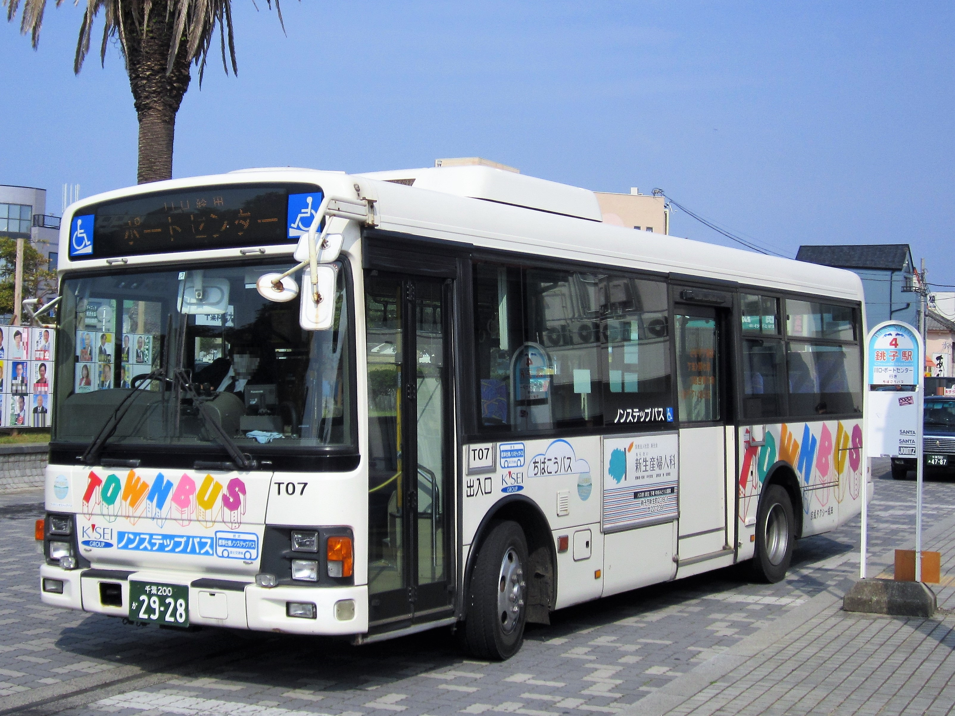 銚子駅前に停車中のちばこうバス（京成タクシー成田） Canon PowerShot A2200